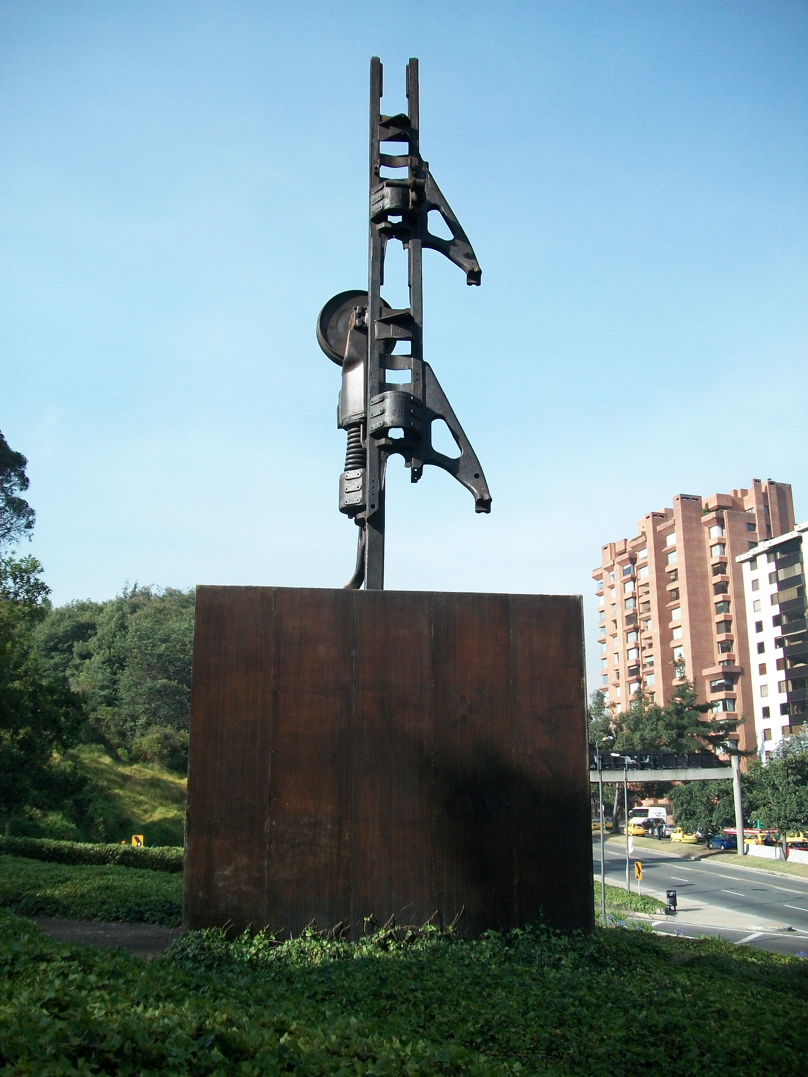 Feliza Bursztyn. Escultura pública. "Homenaje a Gandhi" de 1971 en Bogotá, en la calle 100 con carrera 7.